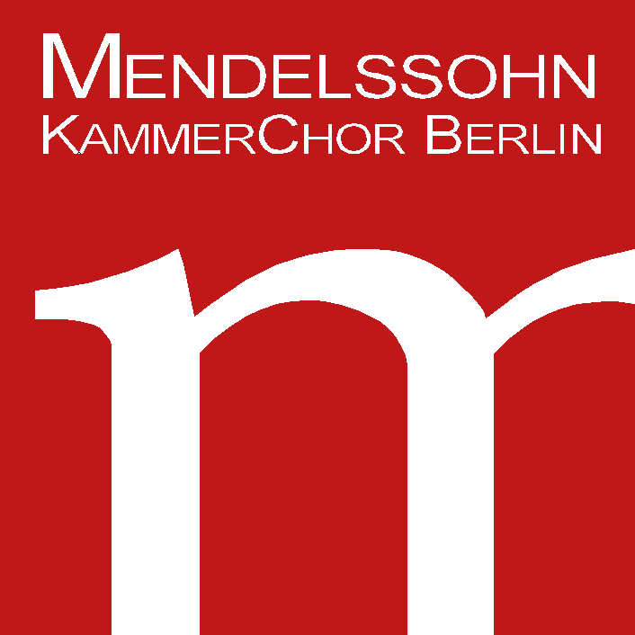 Logo vom MendelssohnKammerChor Berlin